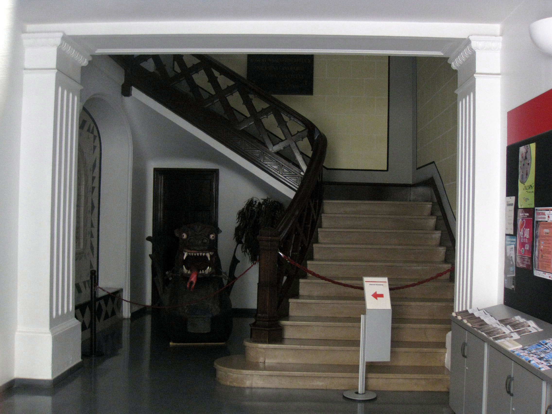 Casa Soler i Palet, al carrer de la Font Vella núm. 28 (Terrassa). Fins a la inauguració de la Biblioteca Central de Terrassa allotjava la biblioteca principal de la ciutat i ara és la seu de l'IMCET (Institut Municipal de Cultura i Esports). Vista del vestíbul i l'escala, vora la qual es pot veure el Drac de Terrassa.